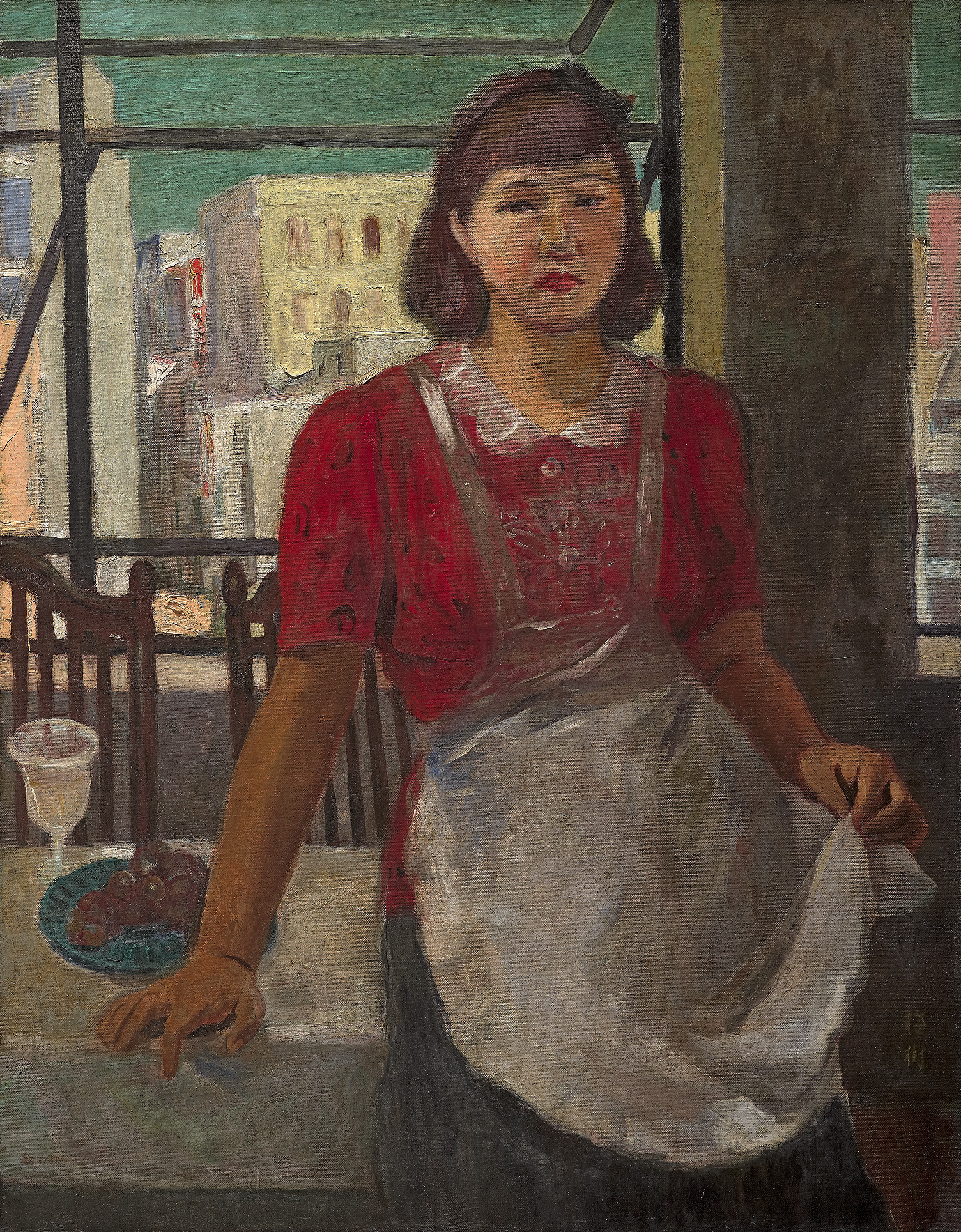 李梅樹作品：紅衣，1939年，油畫。